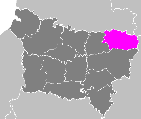 Maps of arrondissements and cantons of France: Arrondissement de Vervins.PNG